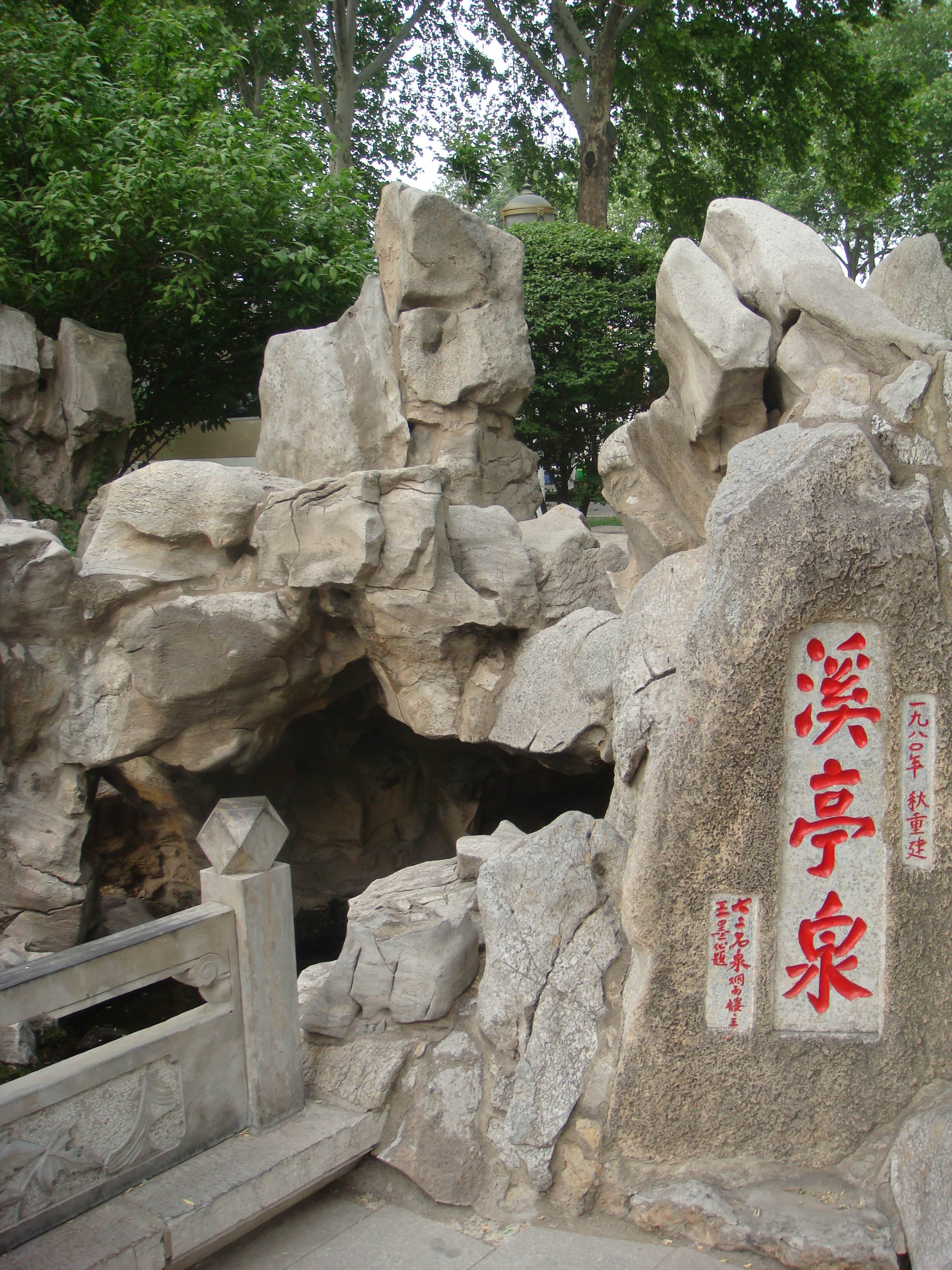 济南溪亭泉，七十二名泉之一。